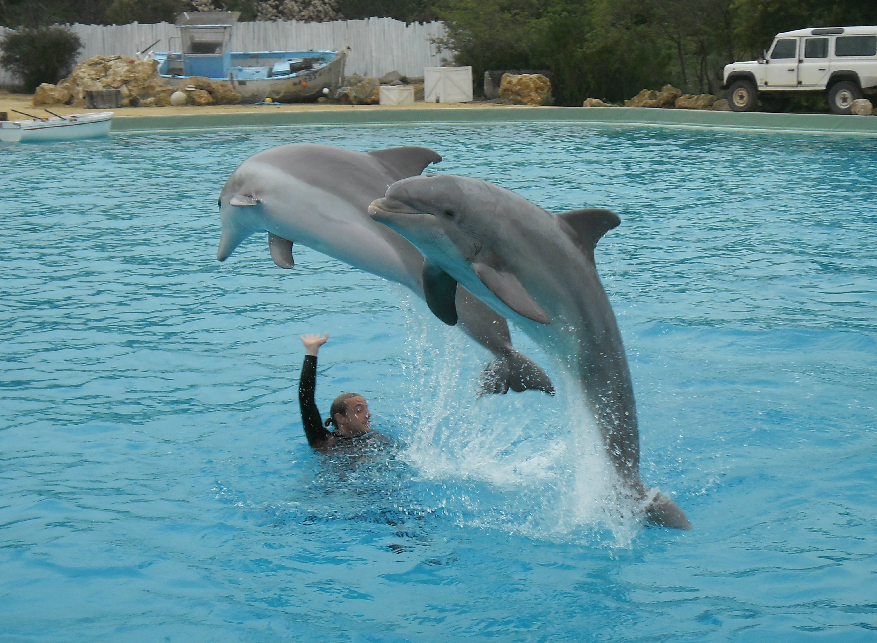 Planète sauvage 2013